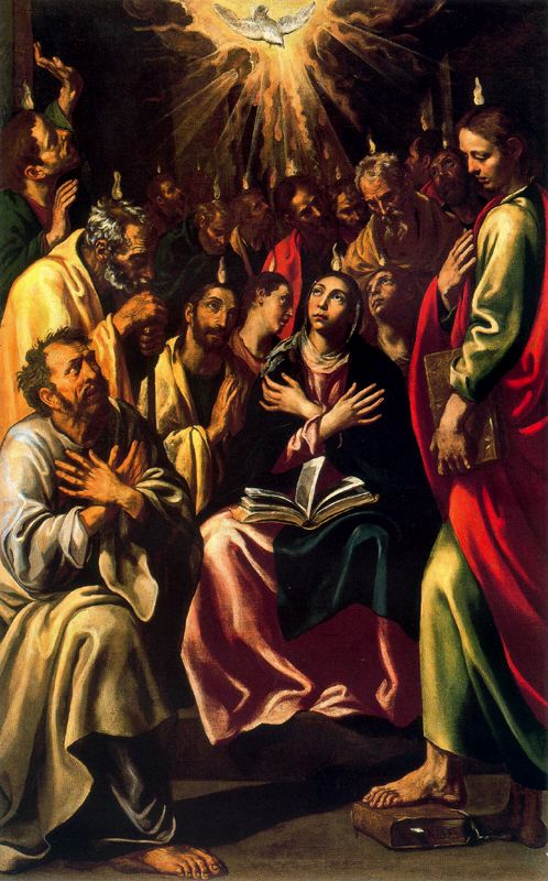 Luis Tristán (Toledo, 1585 - 1624), Pentecostes pt: Museu de Belas Artes, Bucareste, Romênia es: Museo de Bellas Artes. Bucarest. Rumania en: Museum of Fine Arts, Bucarest